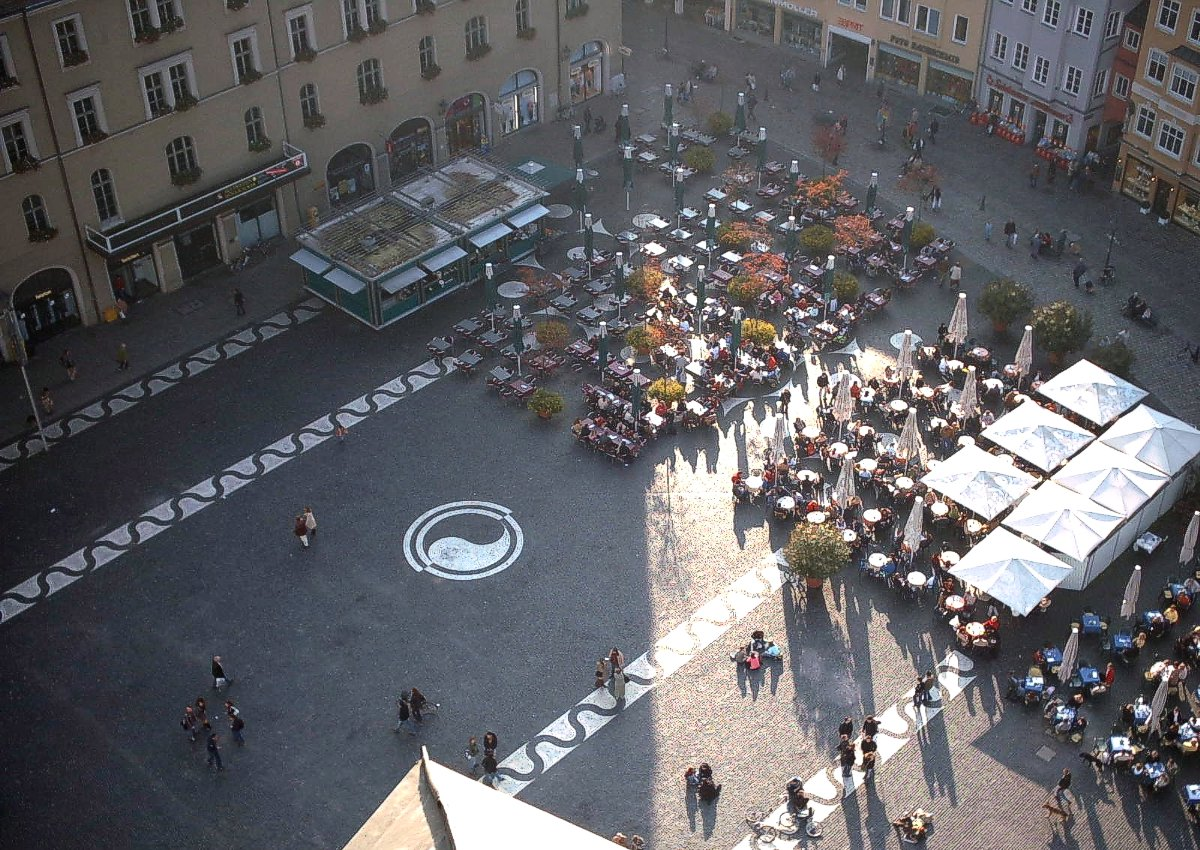 Blick vom Augsburger Perlachturm auf den Rathausplatz